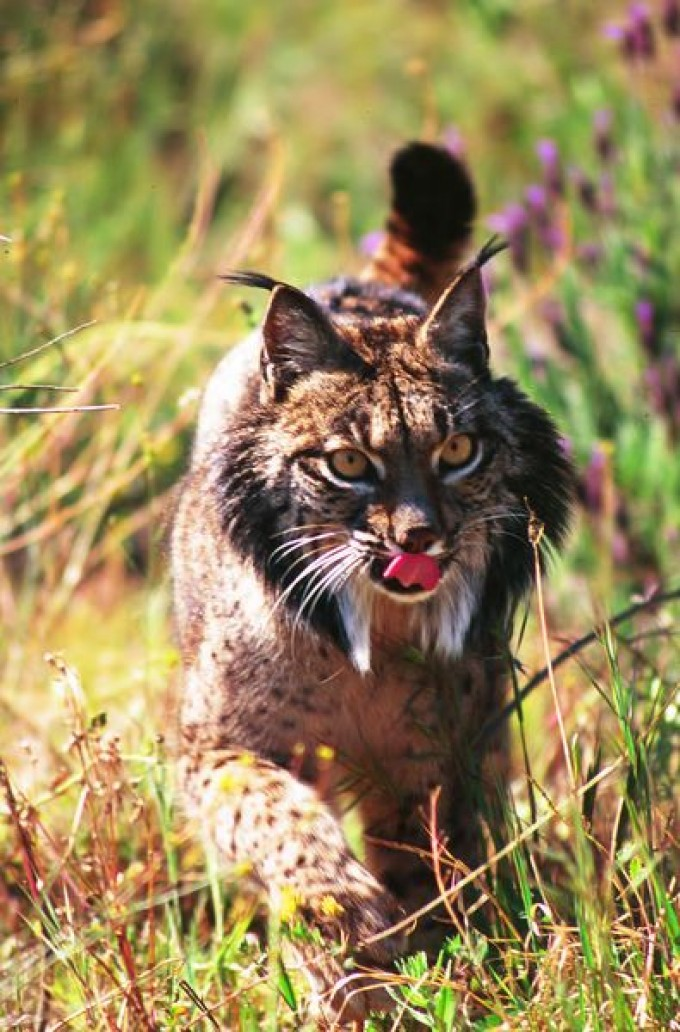 Fotografía tomada en un estudio sobre el lince ibérico, en el Parque Nacional de Doñana, España.